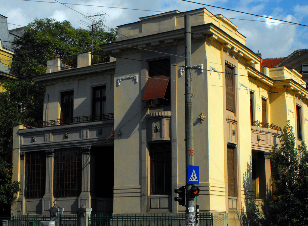 Icoanei 56